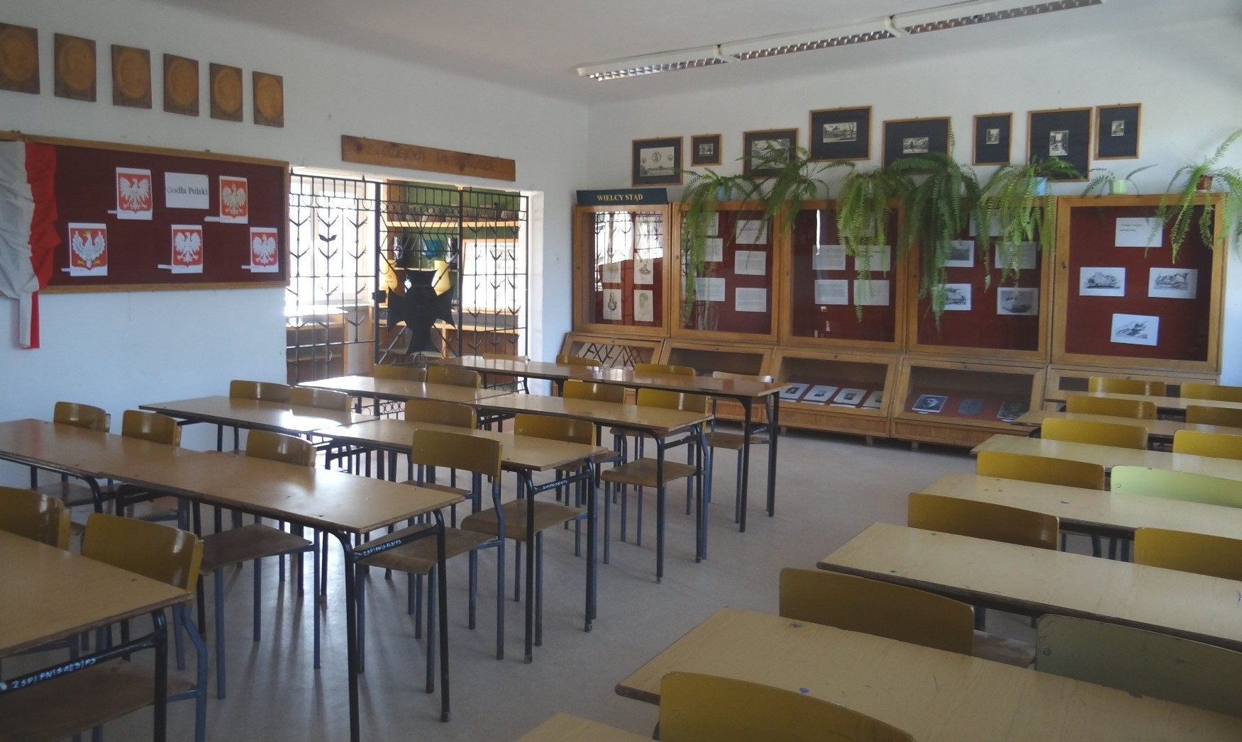 ZSP. Sala lekcyjna